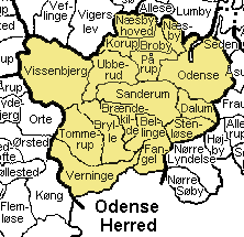 Odense Herred Odense Amt, Denmark. Map by Svend-Erik Christiansen, edited by user:Nico-dk .